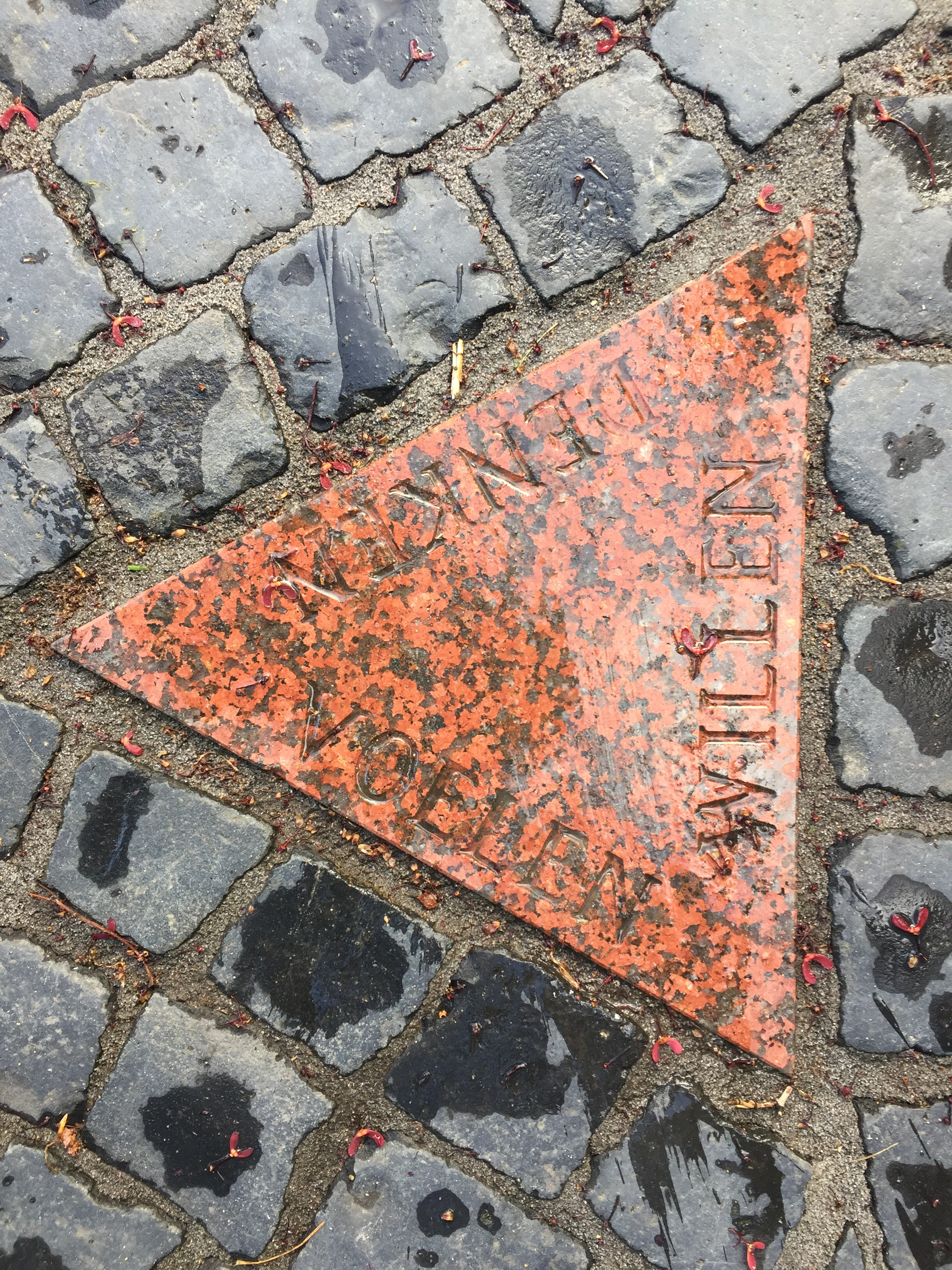 De inscriptie.jpeg